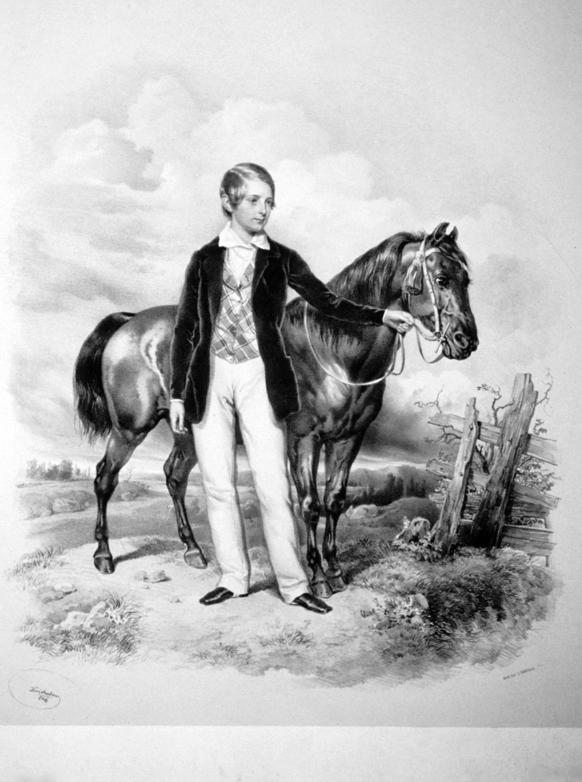 Ferdinand Bonaventura Kinsky als Knabe mit Pferd, Lithographie von Josef Kriehuber, 1846